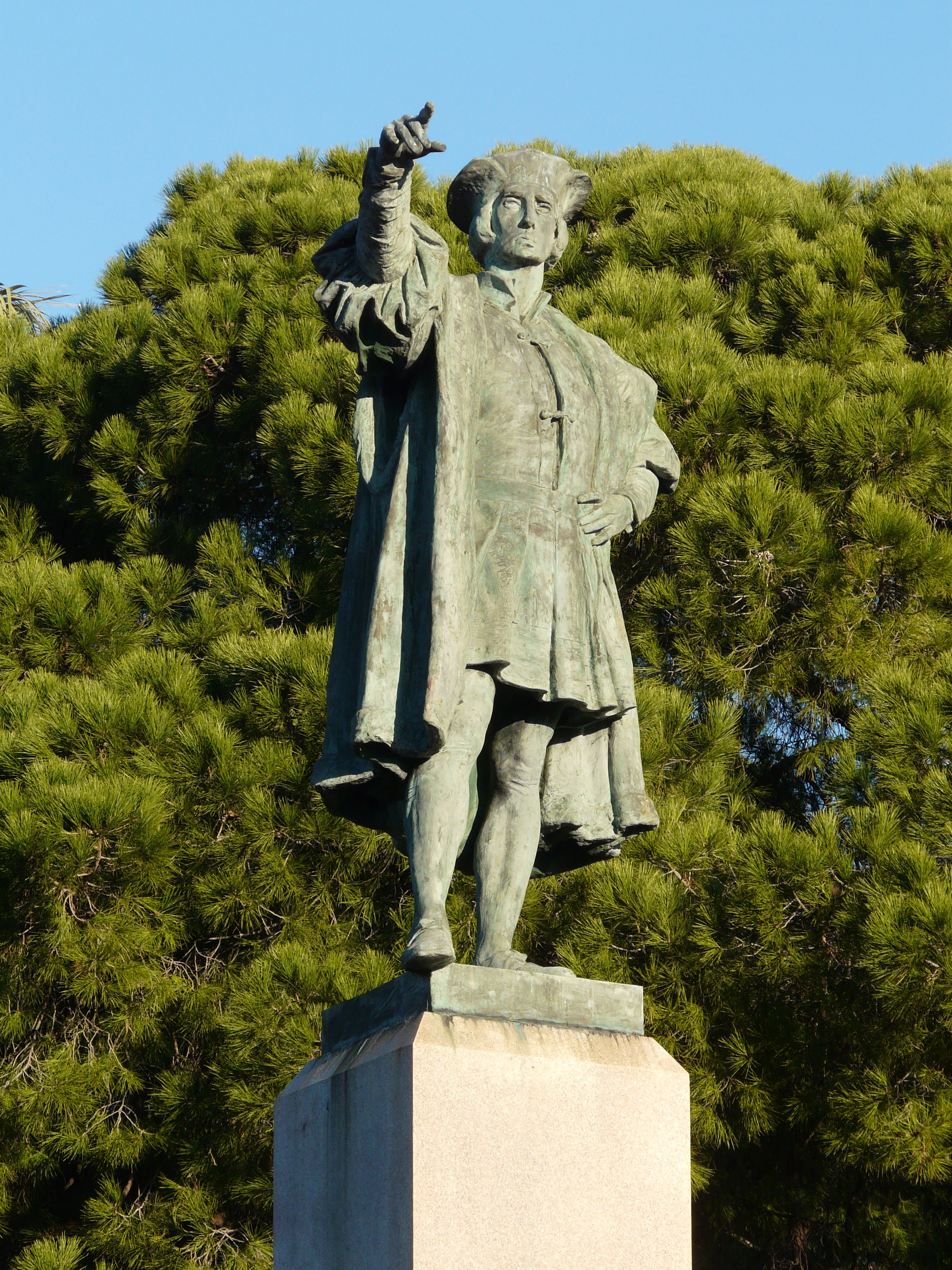 Monumento al navigatore Cristoforo Colombo, Rapallo, Liguria, Italia